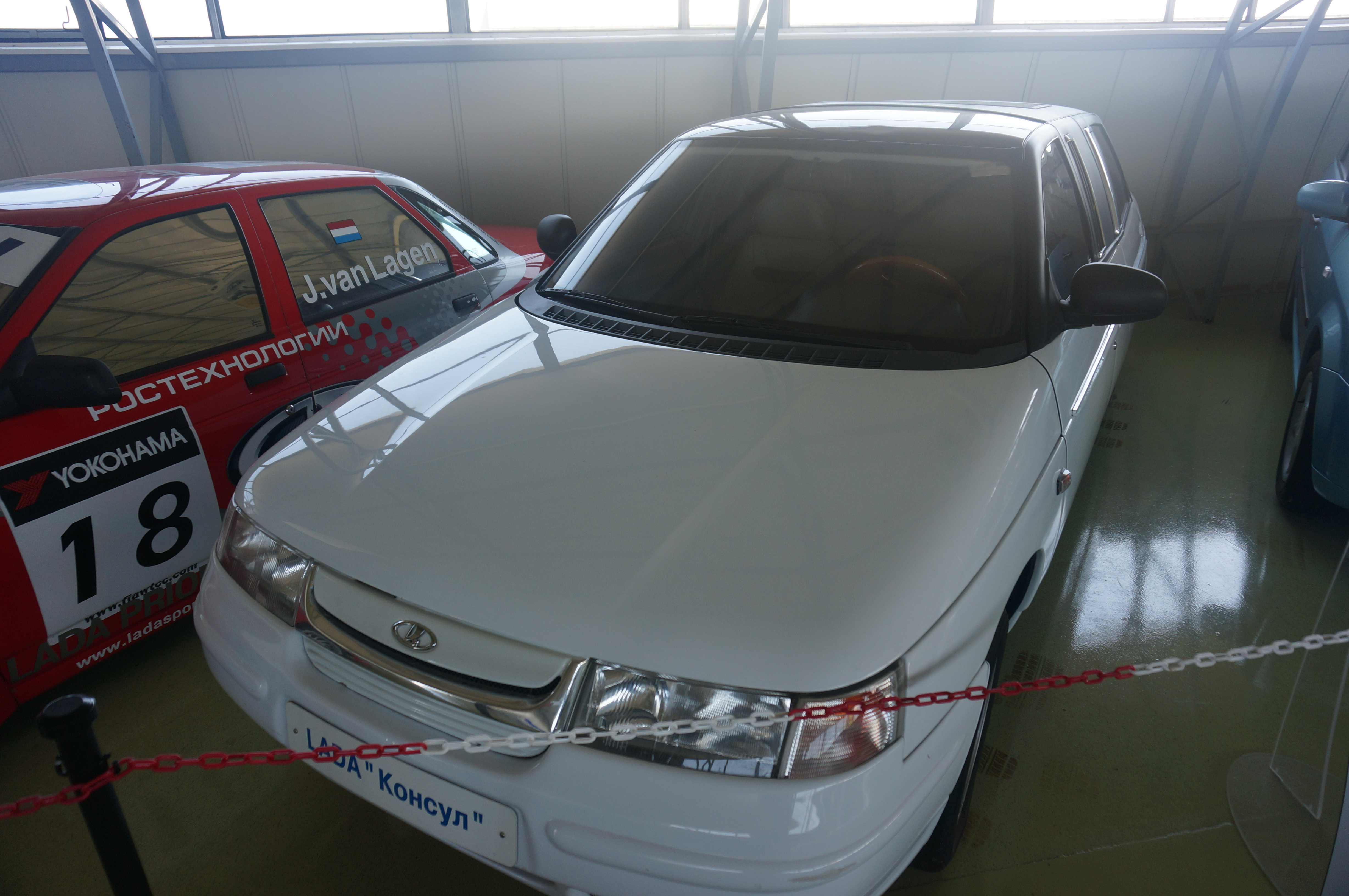 Lada 21109 "Консул" в Техническом музее Тольятти